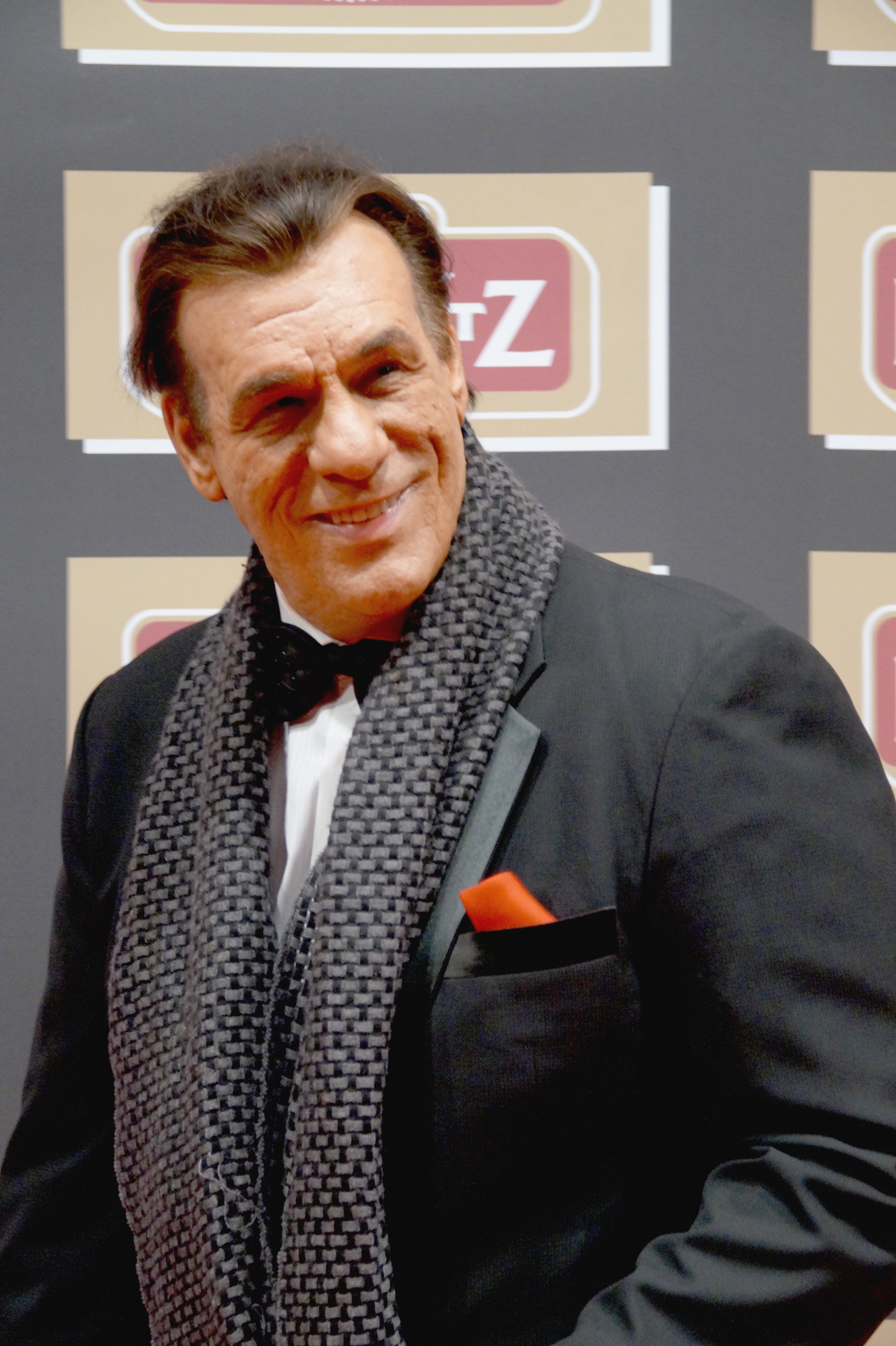 Robert Davi bei der Lambertz Monday Night, im Februar 2016.